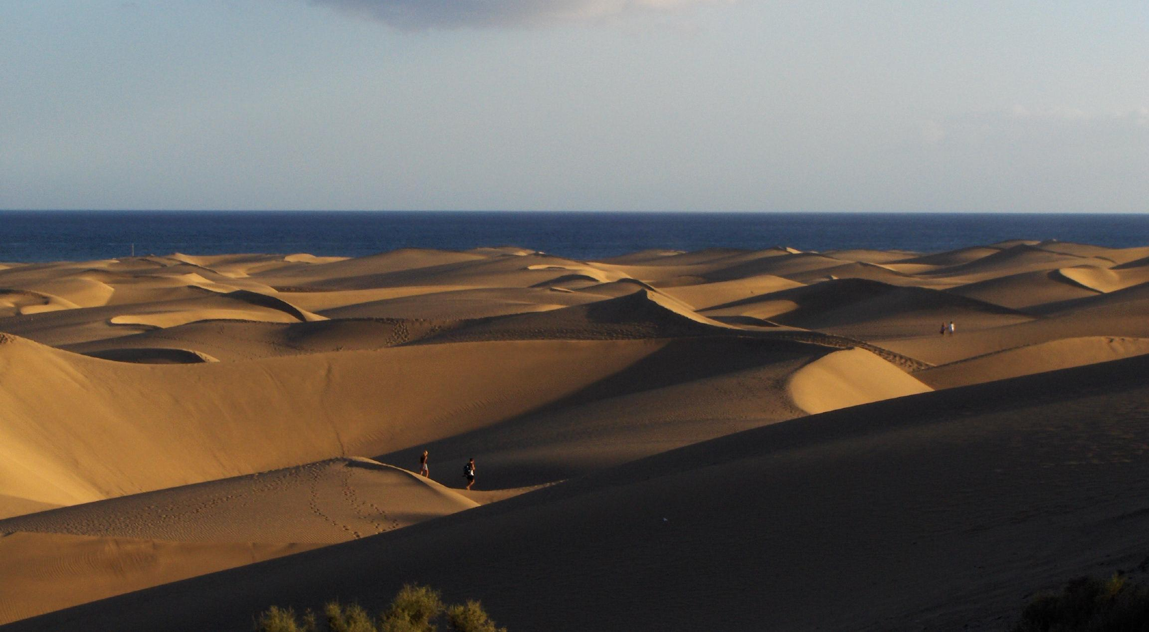 Dunas de Mapalomas